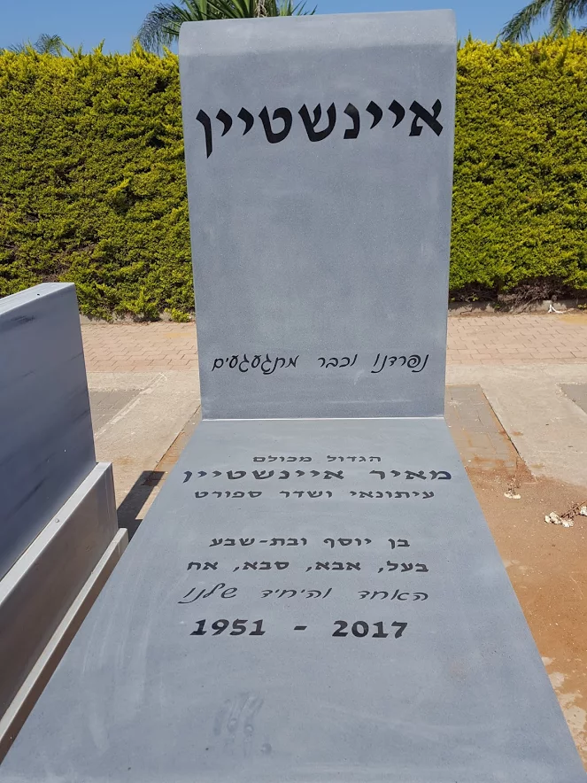 קברו של מאיר איינשטיין בהרצליה צילום :אלי אלון